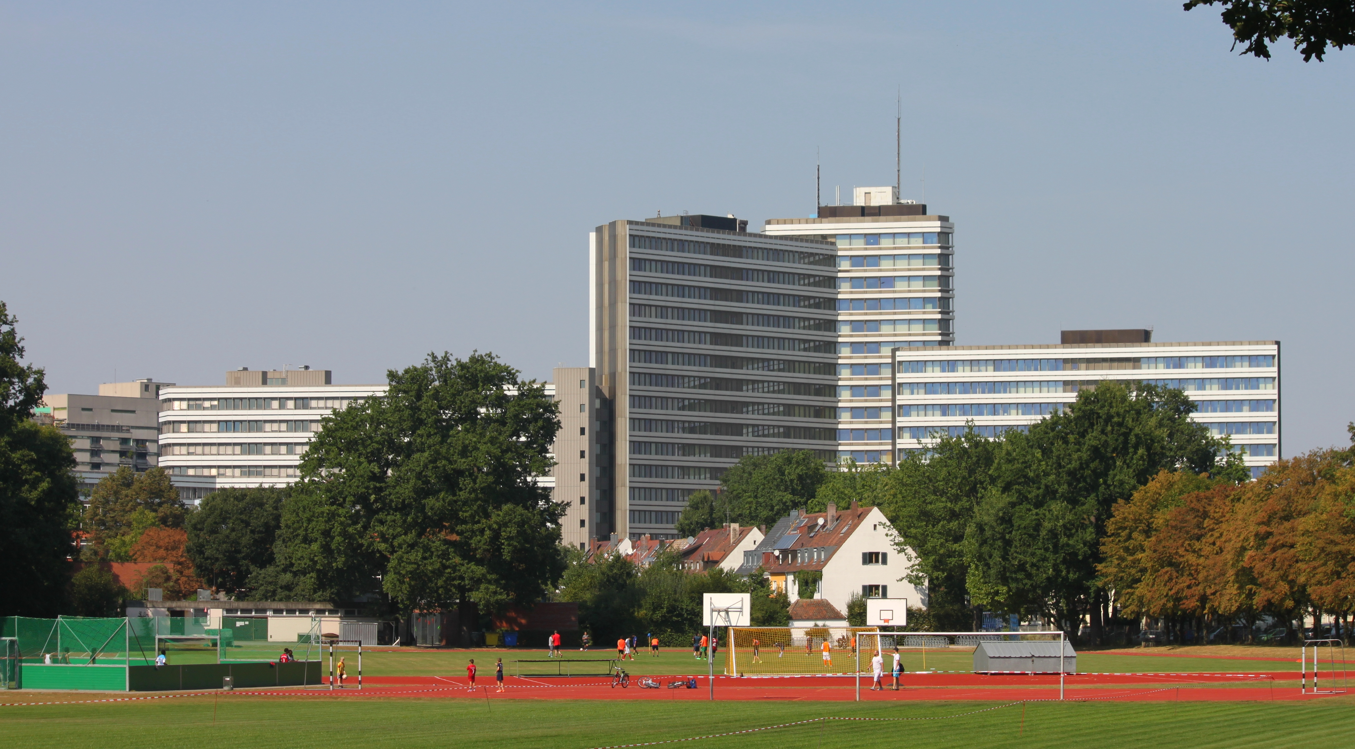 Die Bundesanstalt für Arbeit in Nürnberg von Süd-Osten aus gesehen.